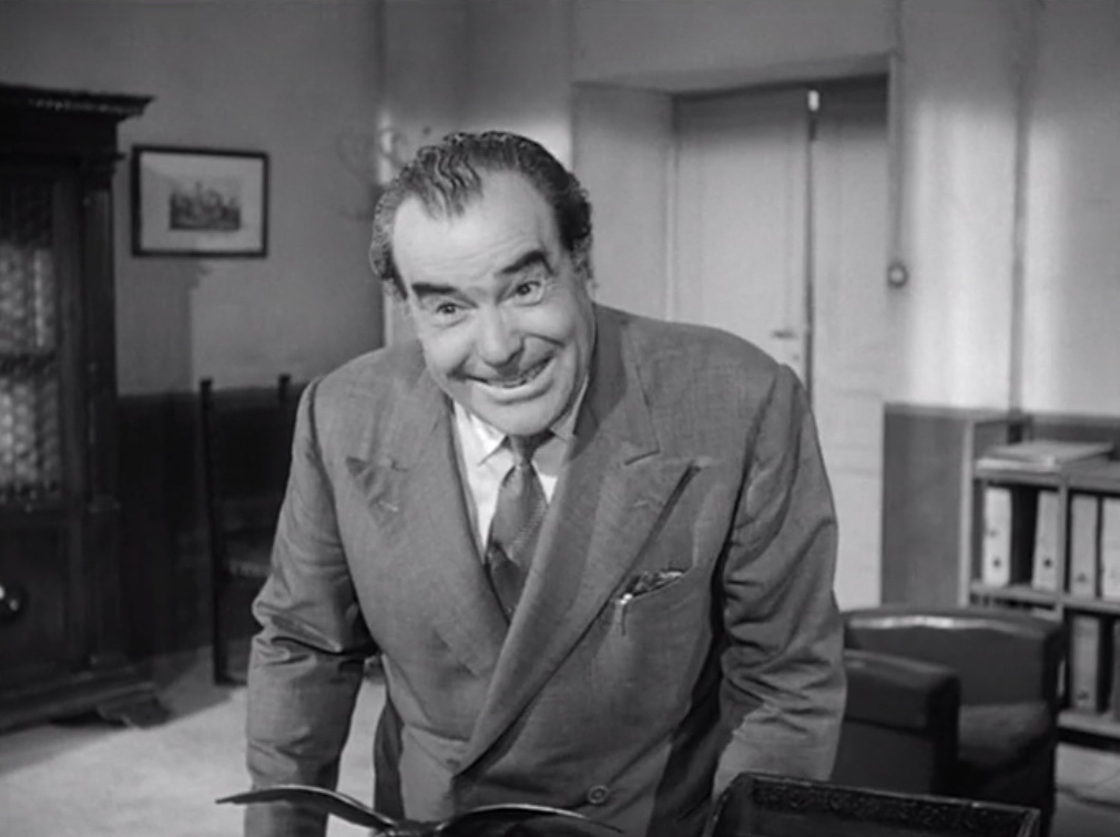 Screenshot dal film Accadde al commissariato (1954)